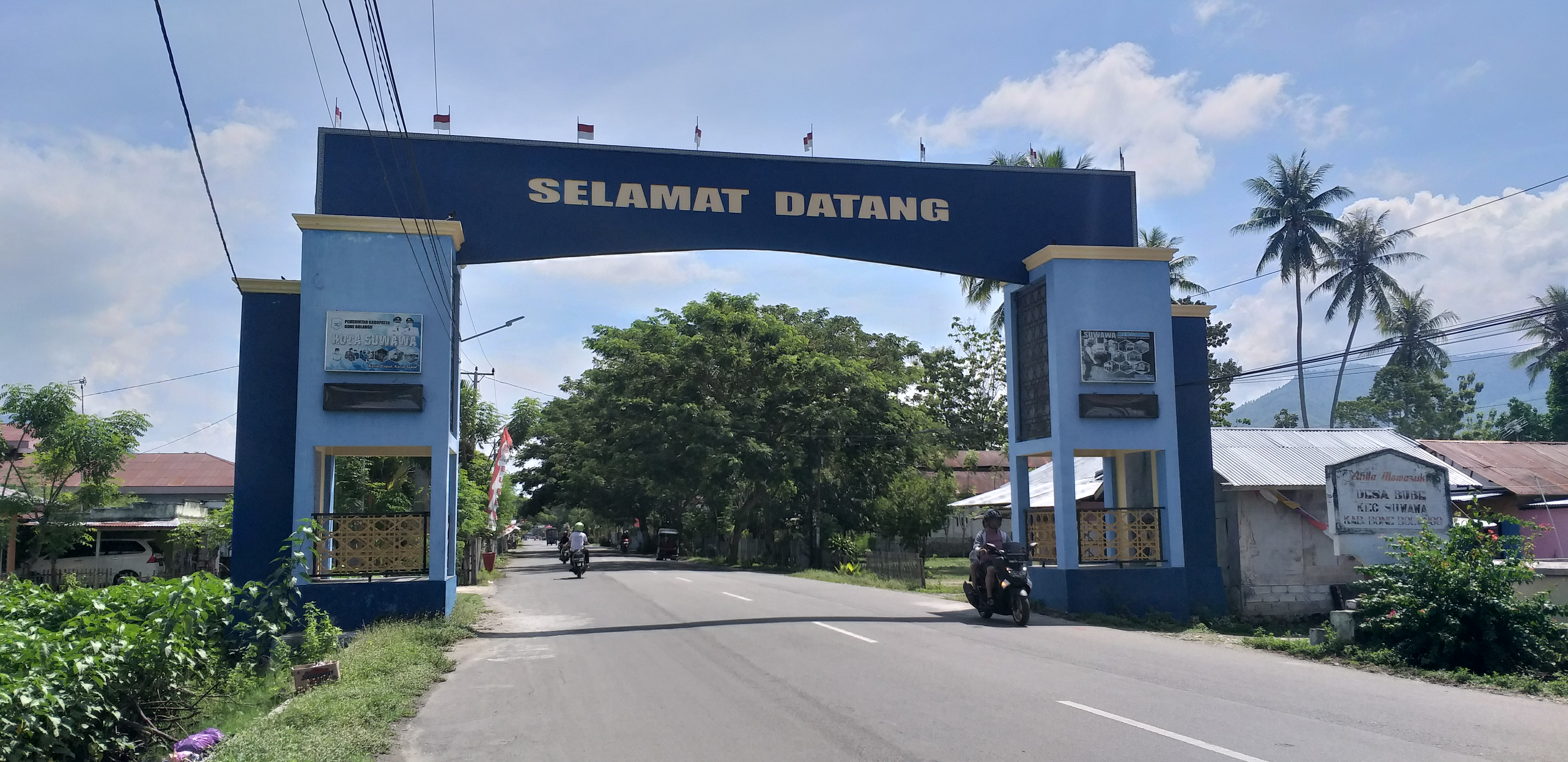 Gerbang Perbatasan Kecamatan Suwawa, Kabupaten Bone Bolango